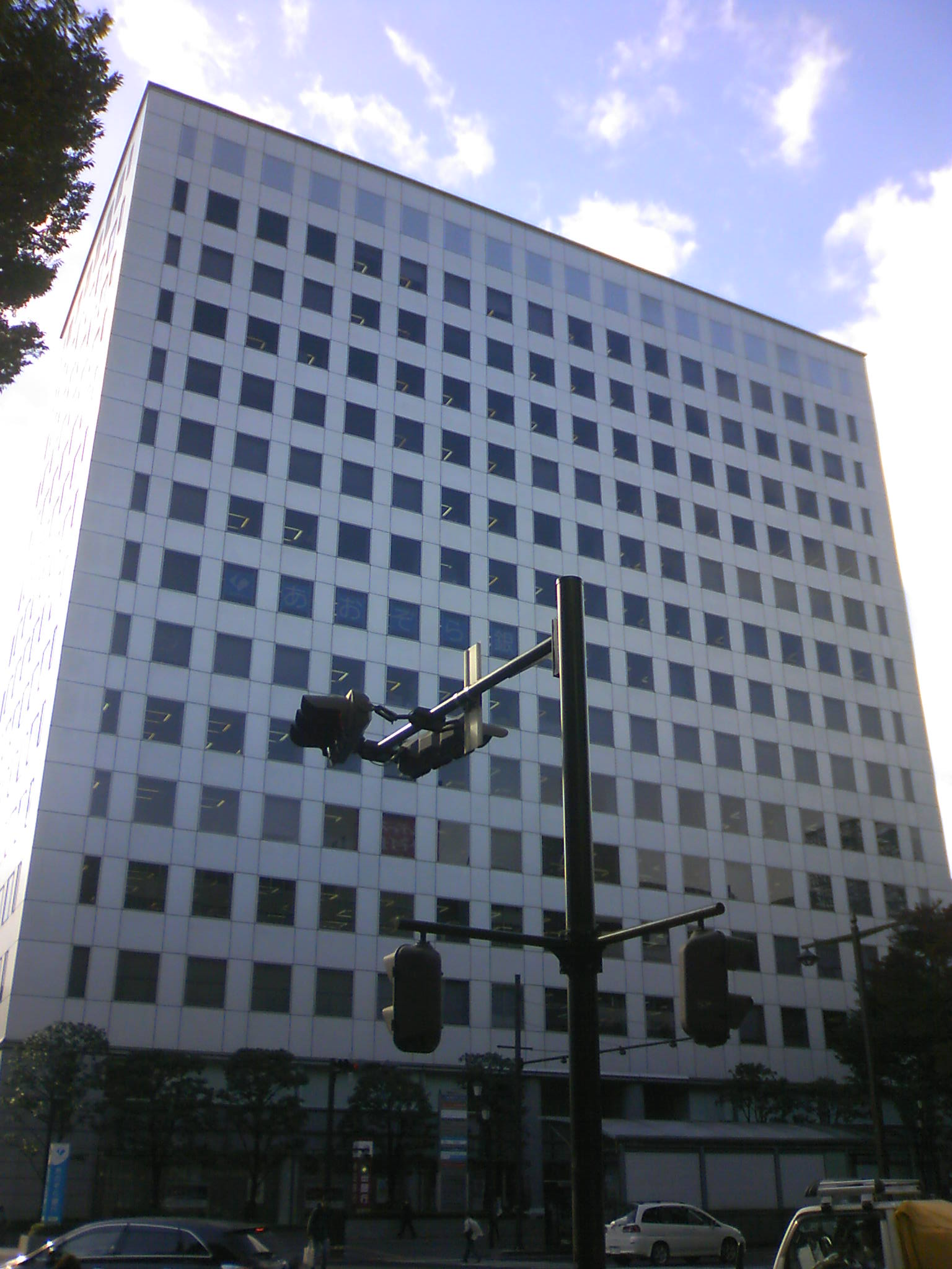 青葉通プラザ